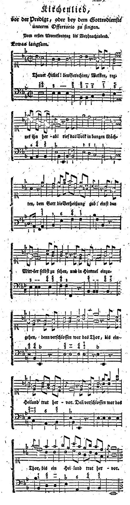 Tauet, Himmel, den Gerechten, Erstdruck der Melodie von Norbert Hauner